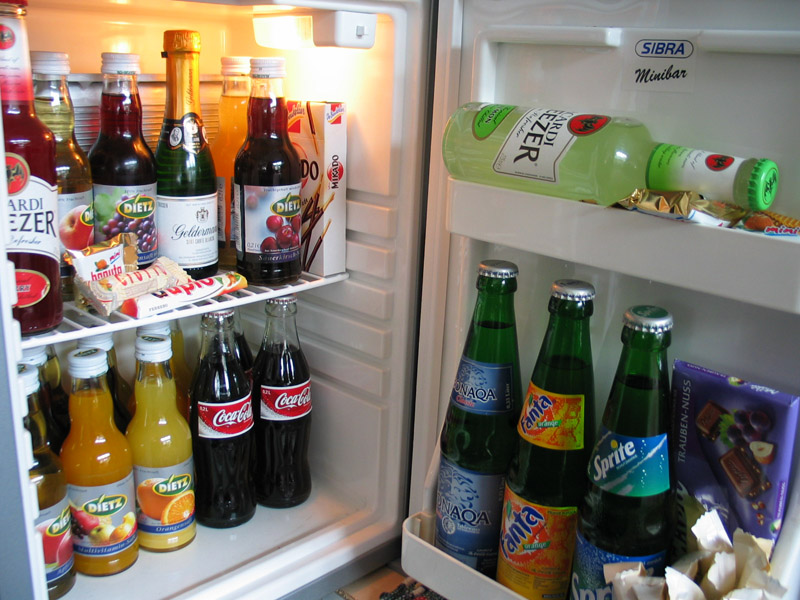 SIBRA-Minibar MB 30